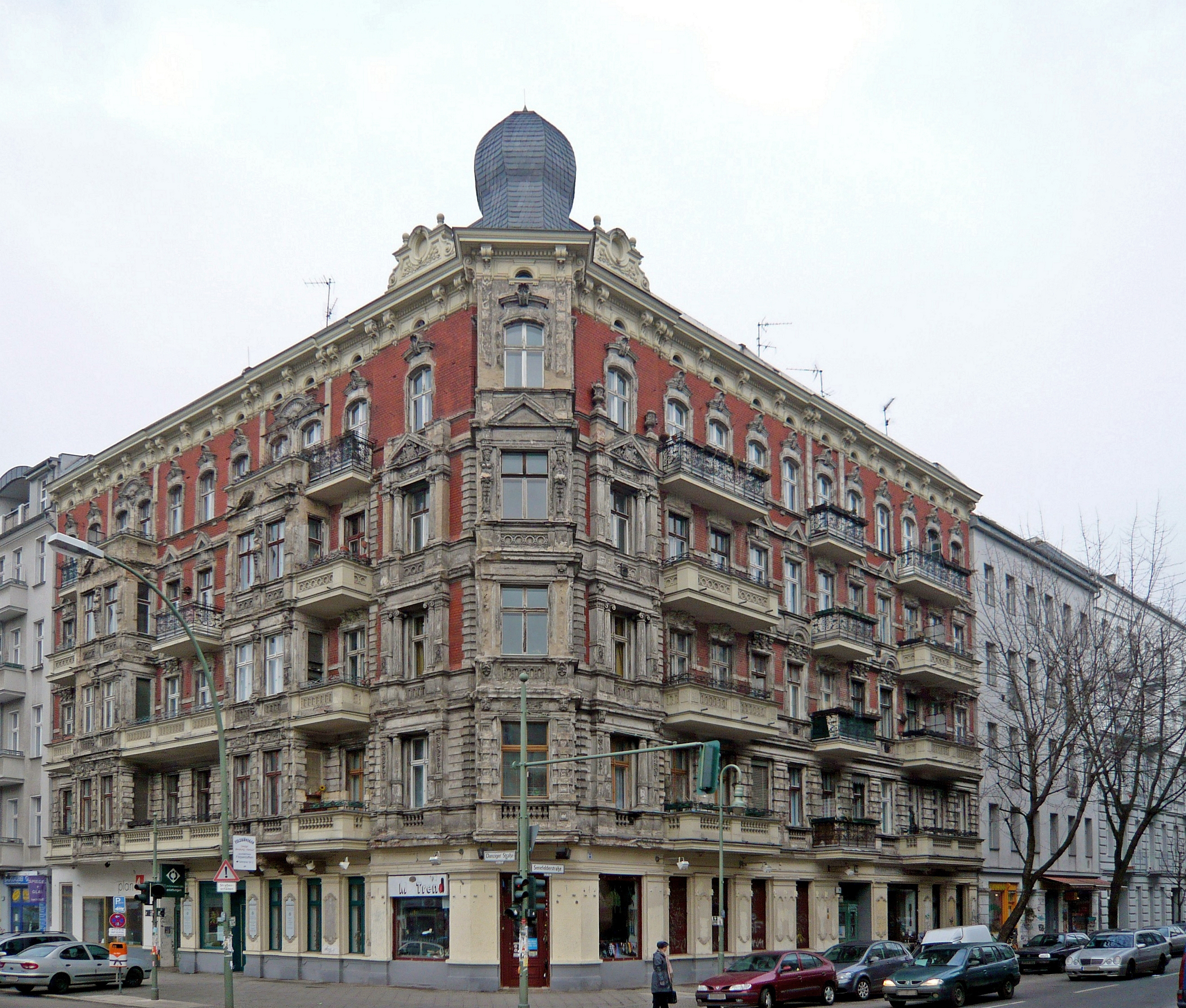 Straße im Ortsteil Berlin-Prenzlauer Berg: Senefelder Str. Ecke danziger